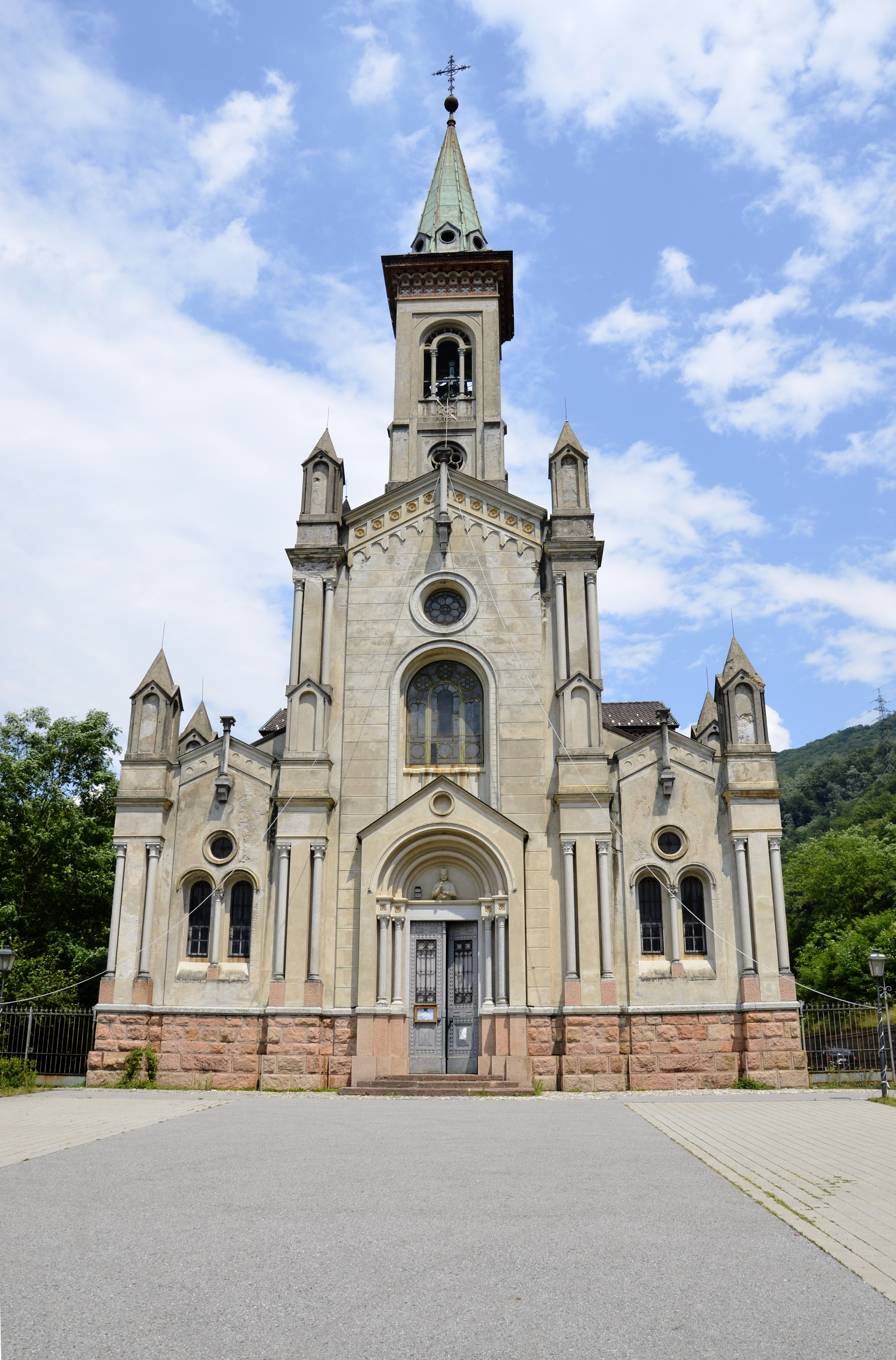 Chiesa di San Carlo